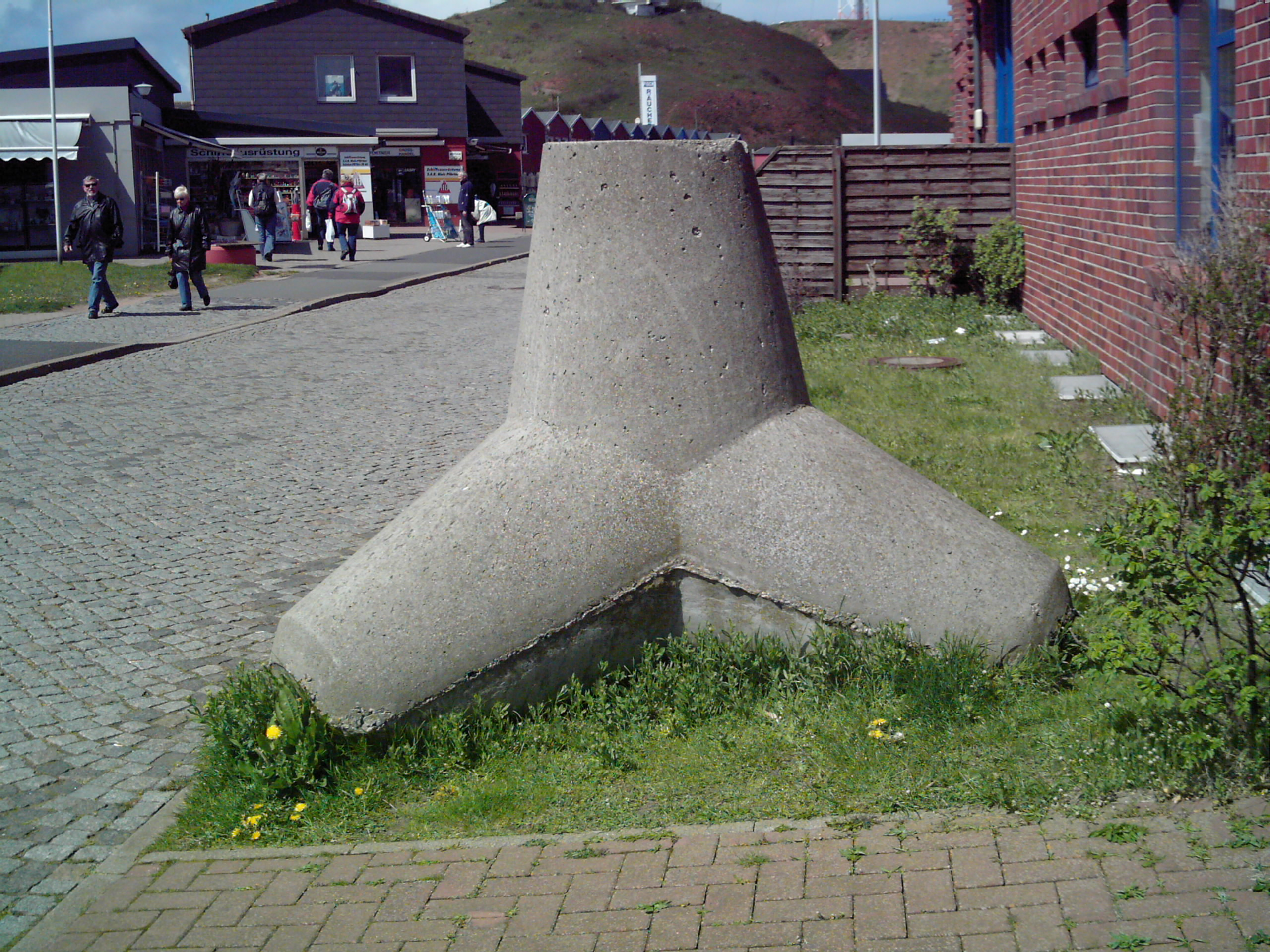 concrete tetrapodes